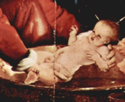 detail